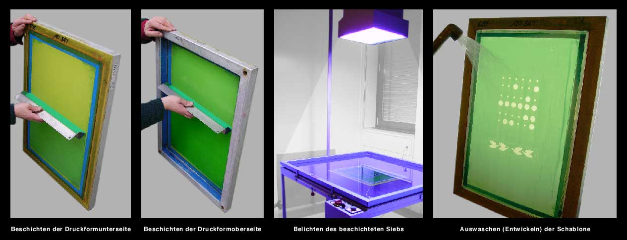 Direktsiebdruckschablone